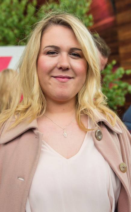 Christina Nilsson var en av artisterna inför Allsång på Skansen som presenteras den 10 juni 2015 på Skansen i Stockholm.